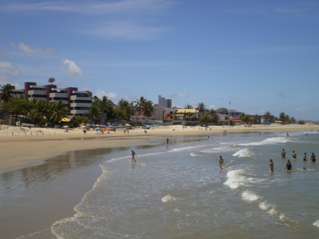 Praia de Pirangi do Norte no município de Parnamirim - RN.